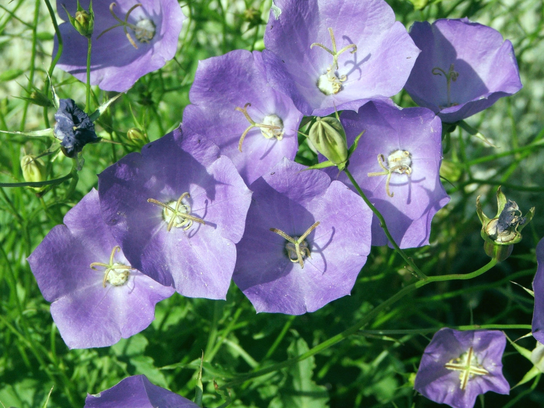 Campanula carpatica (cultyvar)